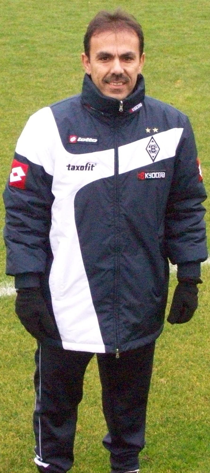 Jos Luhukay Bor.M'gladbach